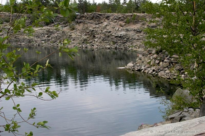 Ключевской карьер.jpg